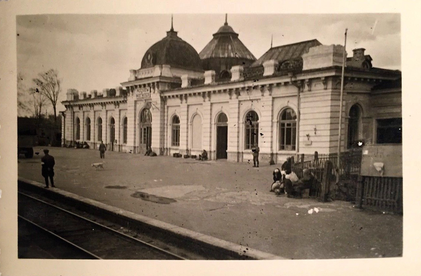 Беларуская (тарашкевіца): Магілёў (Mahiloŭ), вуліца Прывакзальная (vulica Pryvakzalnaja). Чыгуначная станцыя